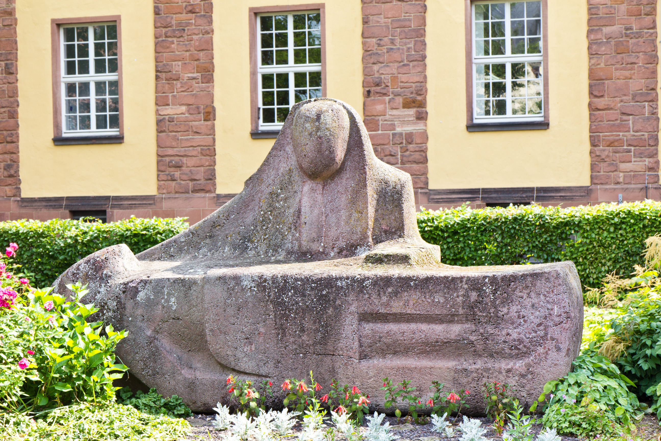 Denkmal in Büdingen (Wetteraukreis) an die Opfer des Zweiten Weltkrieges. Das Ehren- und Denkmal wurde 1959/1960 vom Marburger Bildhauer Dieter Paffrath erschaffen. Es befindet sich im Max-Halberstadt-Park vor der Stadtschule (Grundschule) in Büdingen.